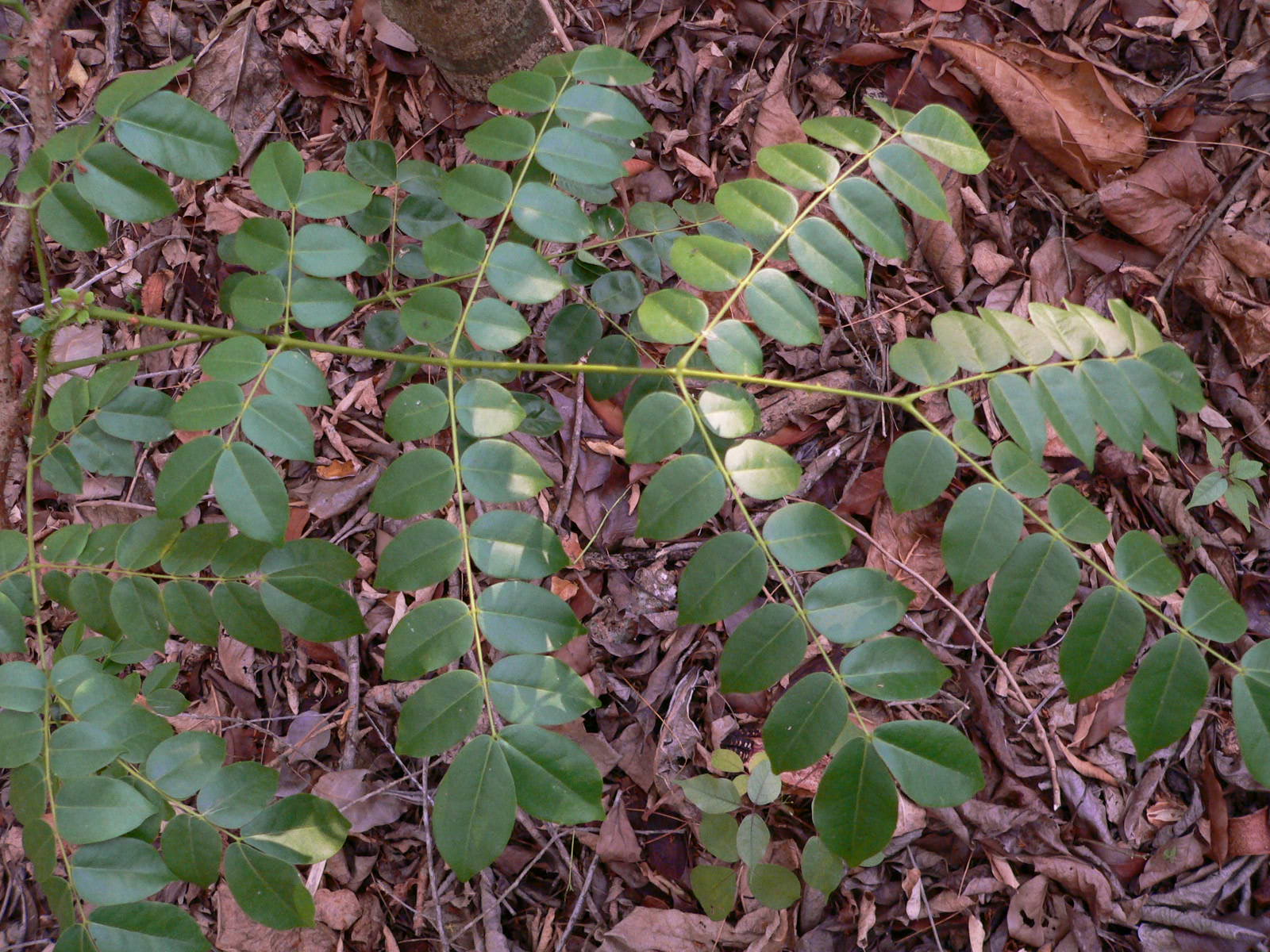 Caesalpinia bonduc, feuille, Guadeloupe